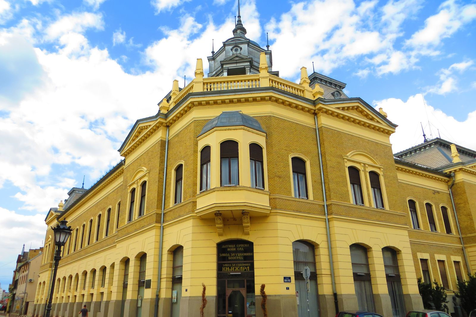 Matica Srpska